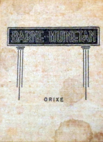 Liburuko azala